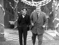 Charlie Chaplin en una escena del filme Tango Tangles (1914).